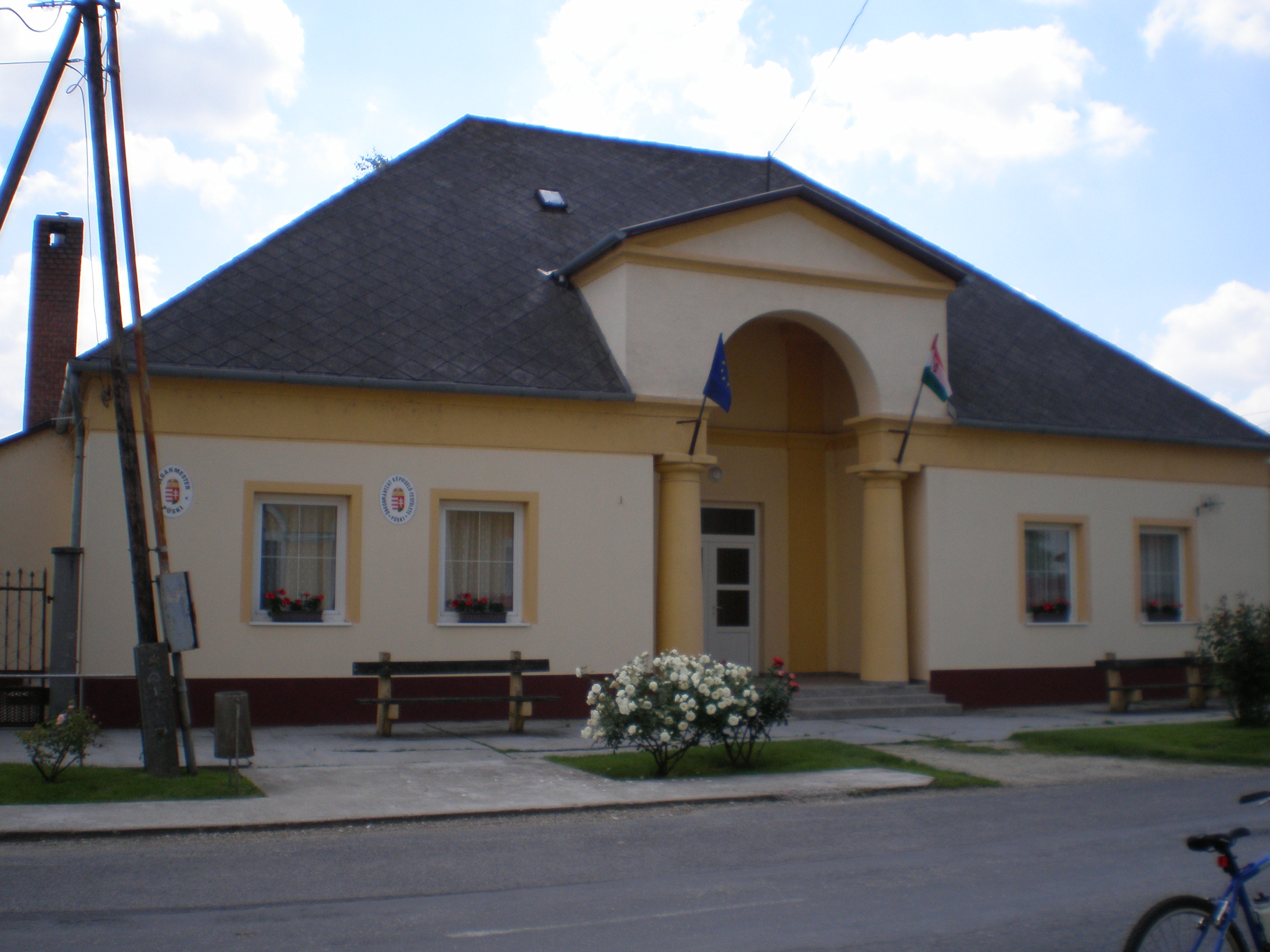 Polgármesteri hivatal Püskiben (Győr-Moson-Sopron megye, Magyarország)